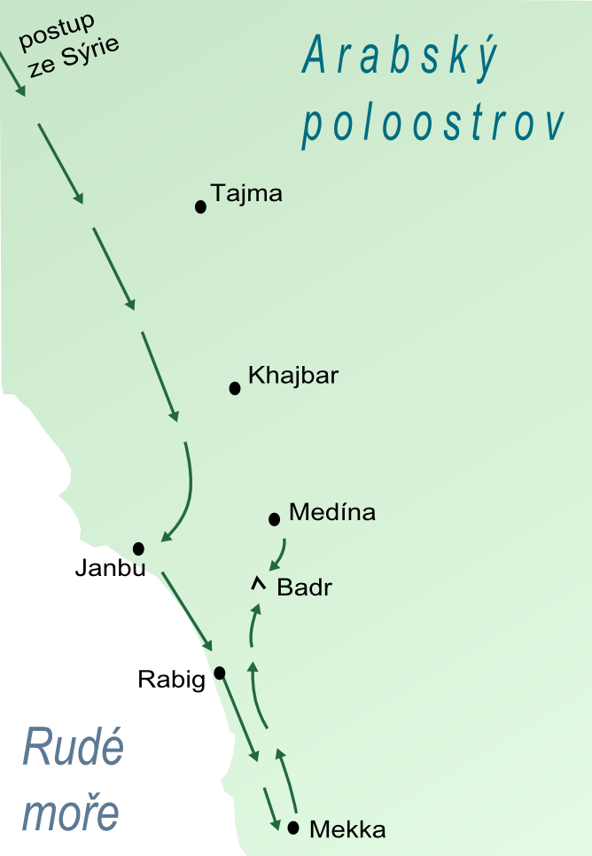 Bitva u Badru